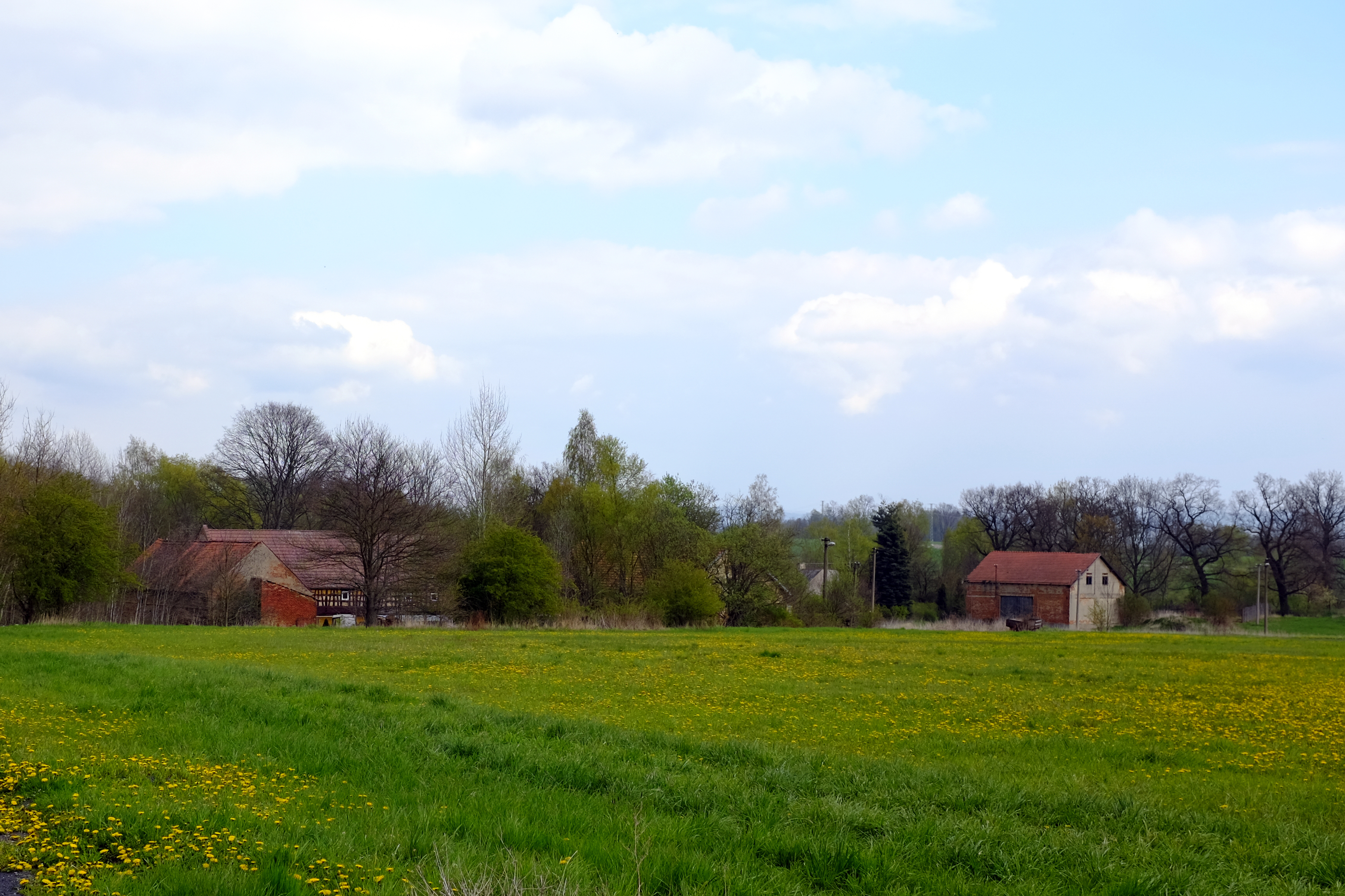 Osada Lesina, místní část obce Třebeň, okres Cheb